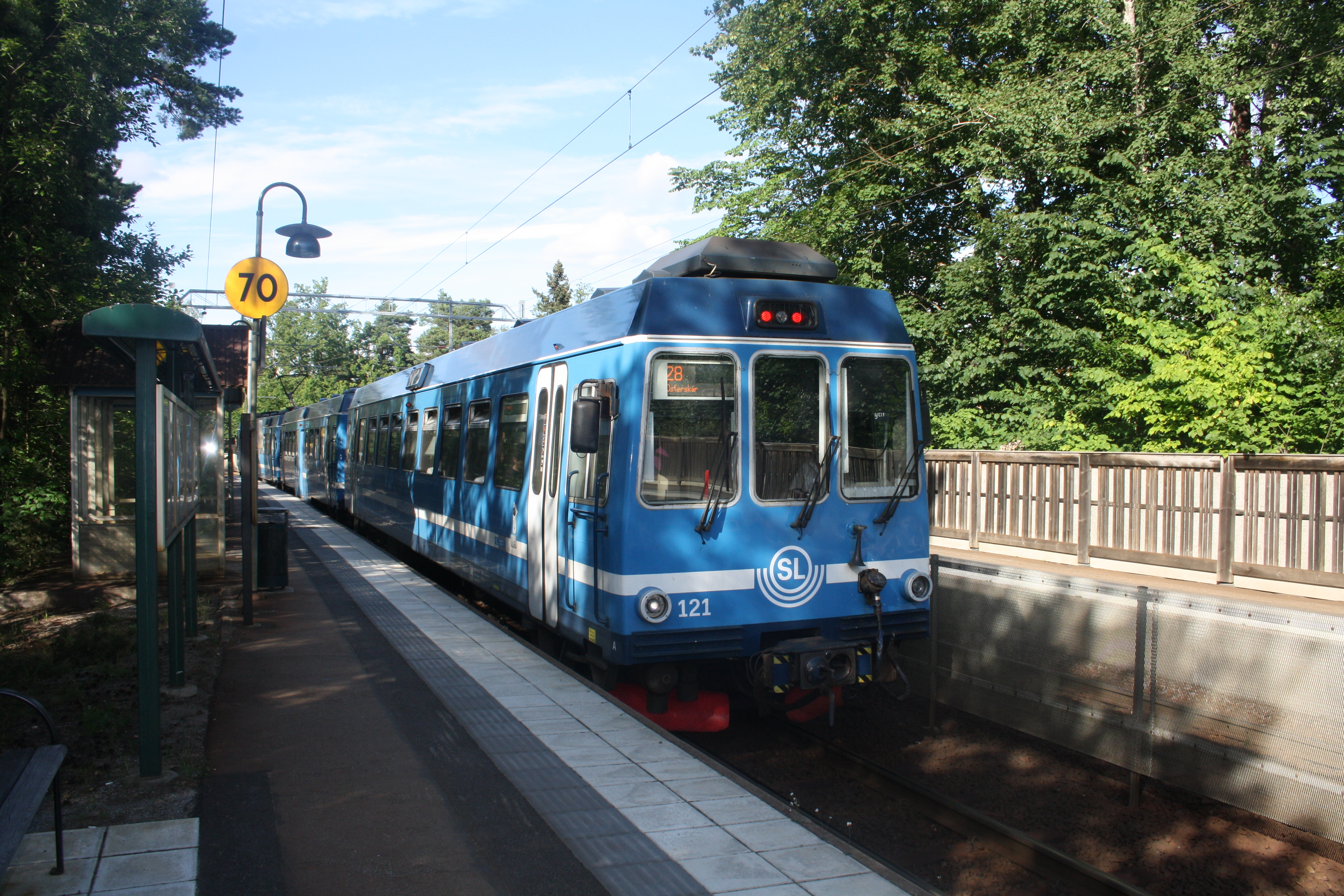 Roslagsbanan kommer till Bråvallavägen